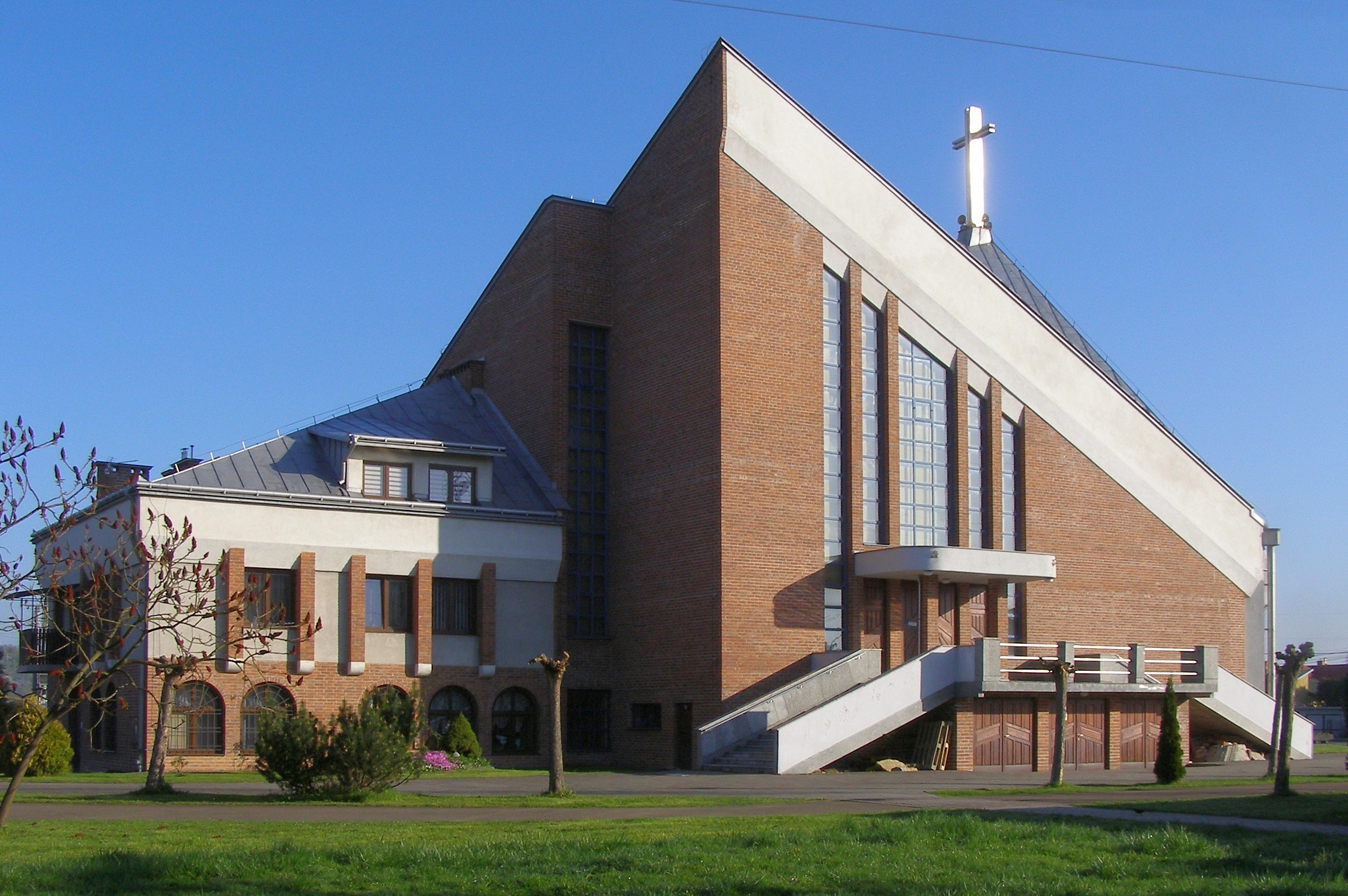 miasto Jasło, ul. Rafineryjna 15